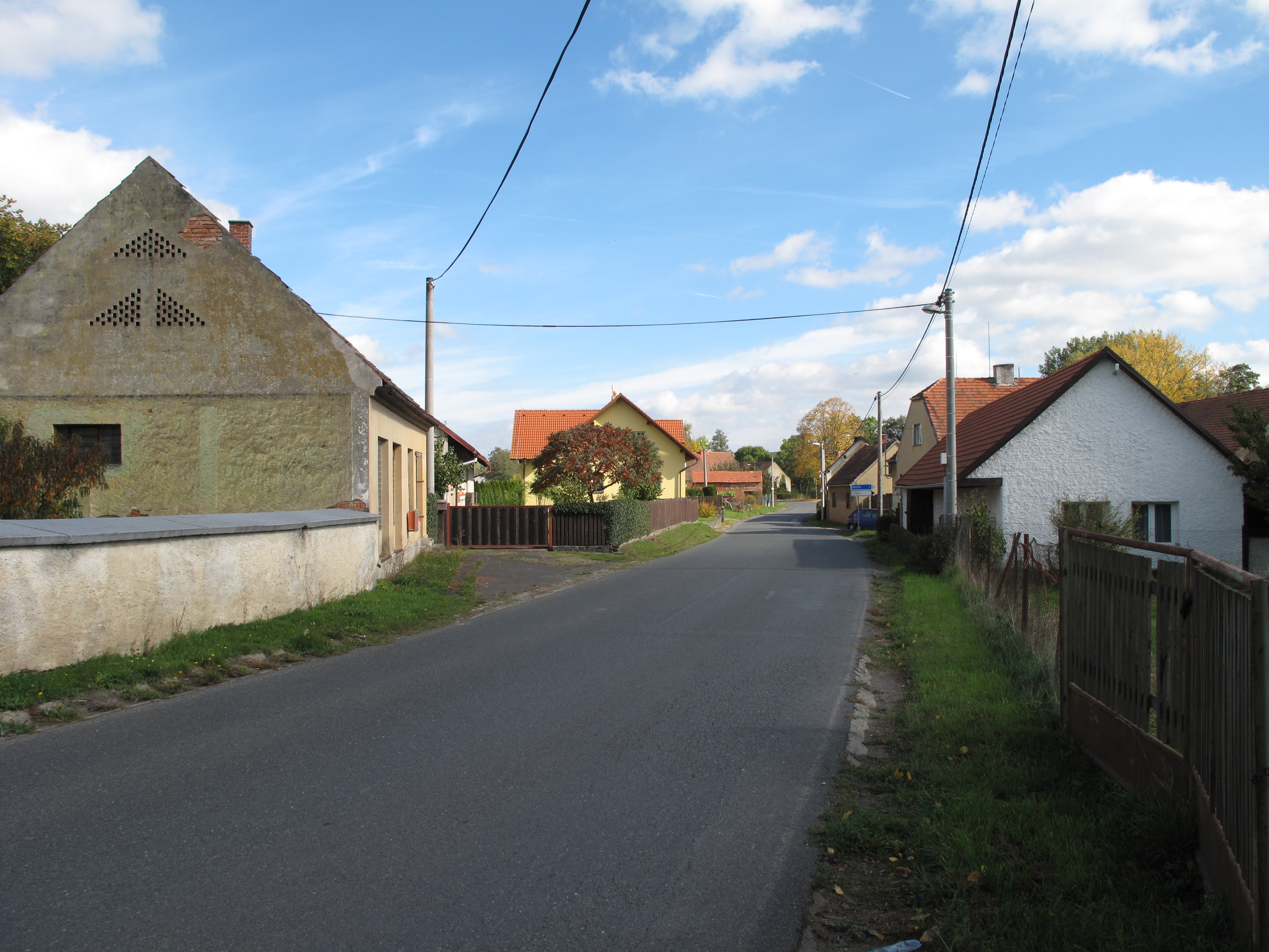 Malechov. Okres Klatovy, Česká republika.